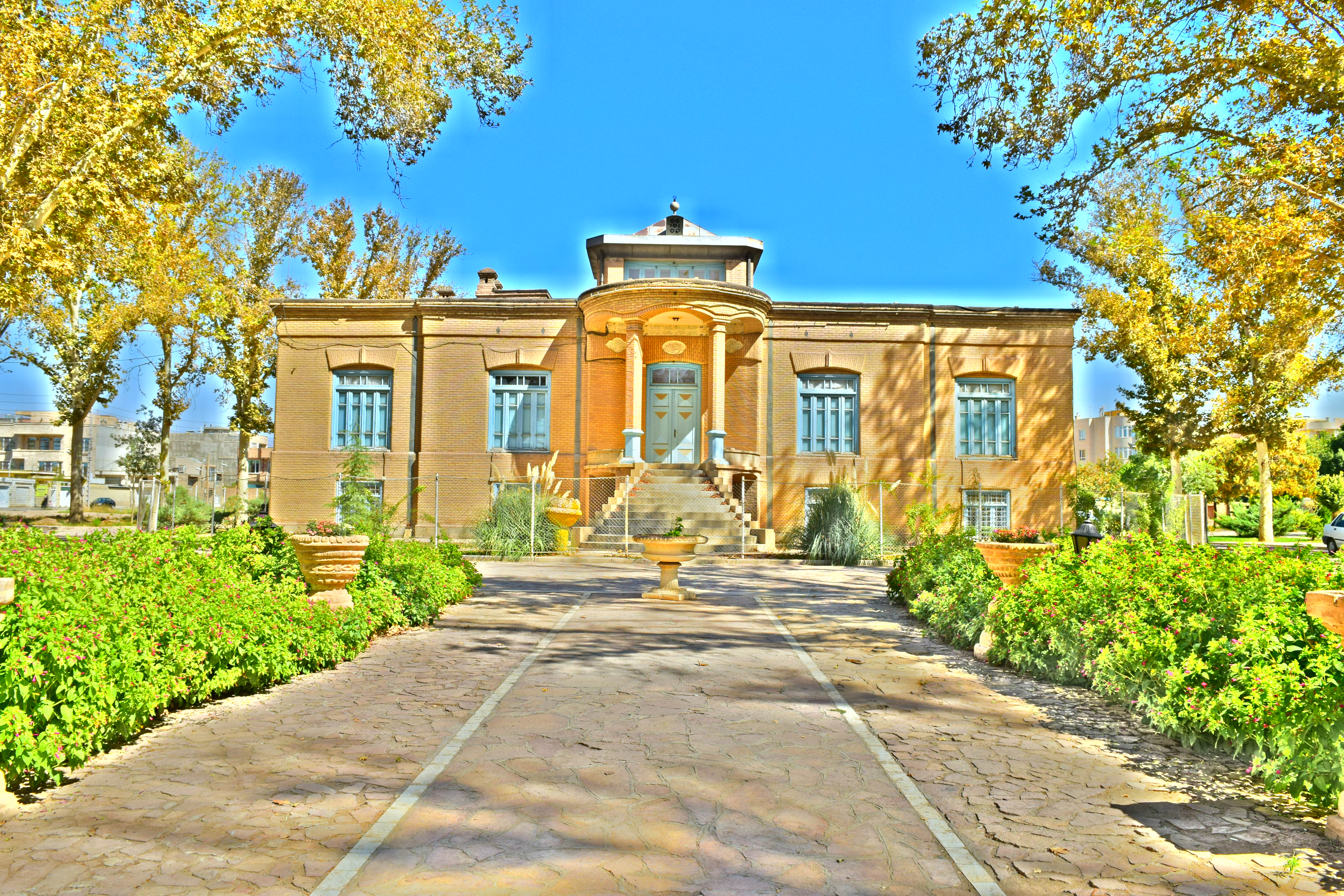 عمارت امین اسلامی تصویر با تکنیک HDR تهیه شده است